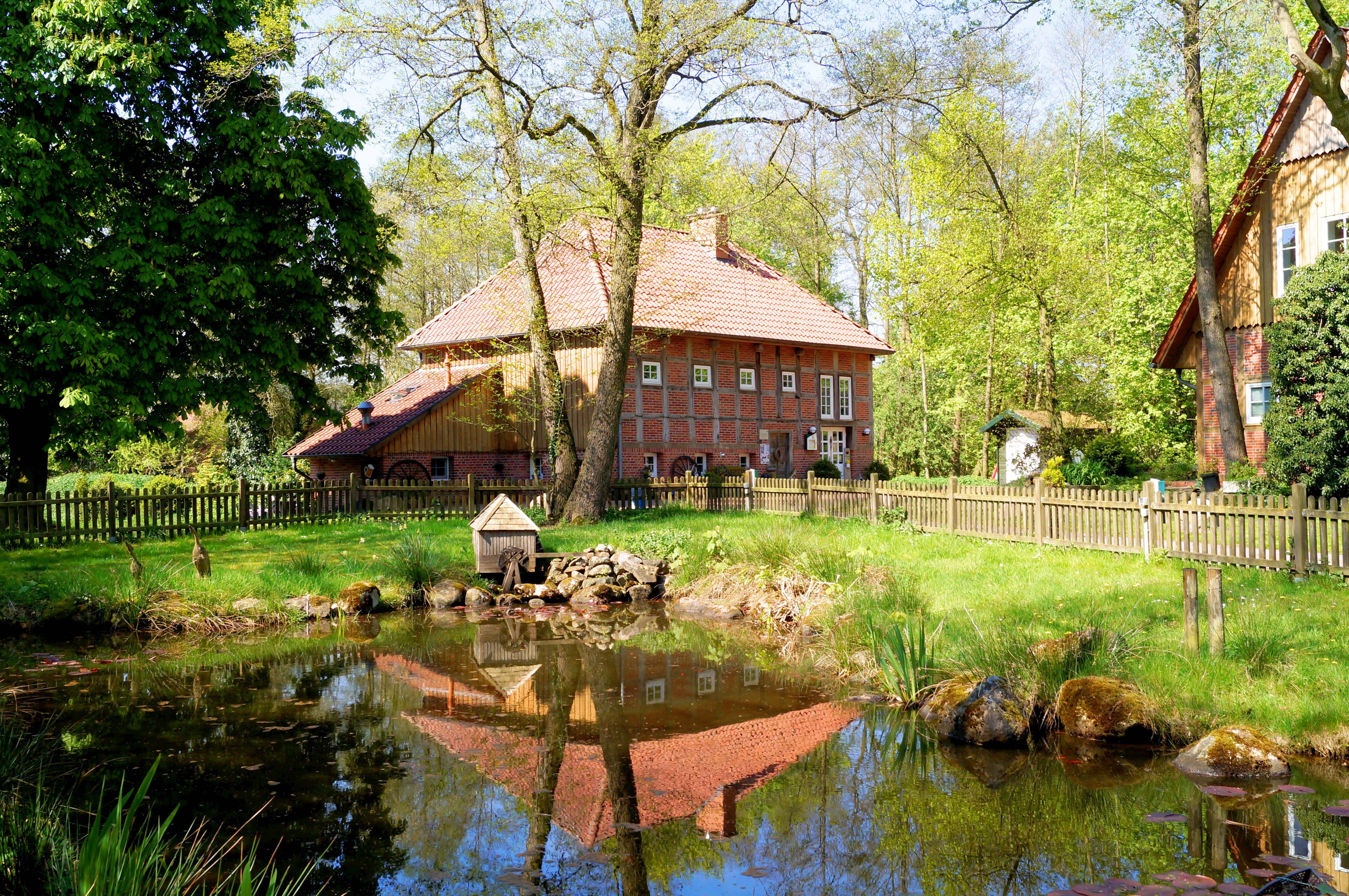 Das Bild zeigt die Alte Wassermühle mit Gastbetrieb im Zentrum des Gutes Duderstadt. Rechts sieht man das wieder errichtete Backhaus, das auf den Fundamenten eines Flügels des ehemaligen Herrenhauses steht. Im Vordergrund befindet sich der obere Mühlenteich.